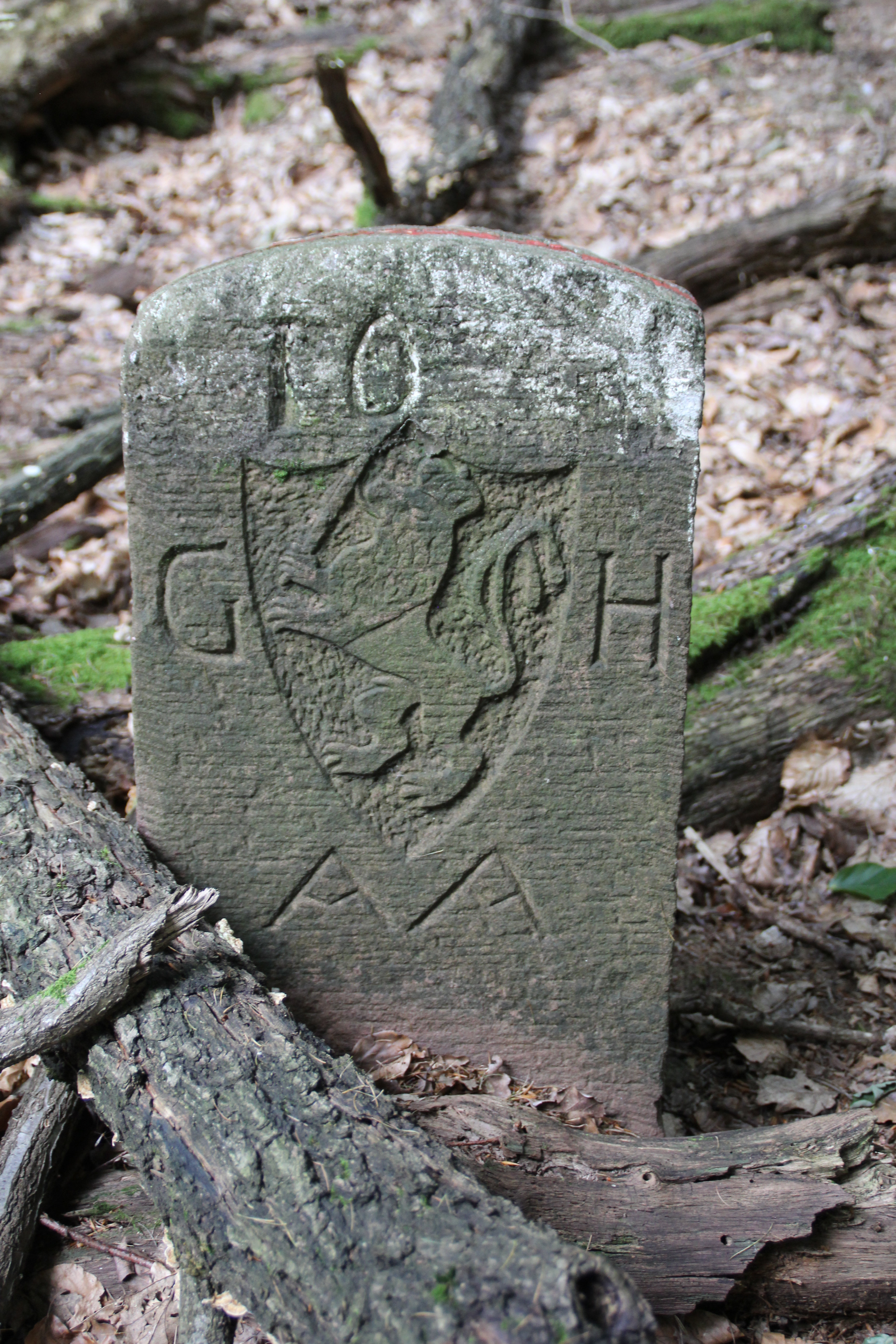 Grenzstein 216 auf der Hohen Mark zwischen Alzenau und Mömbris